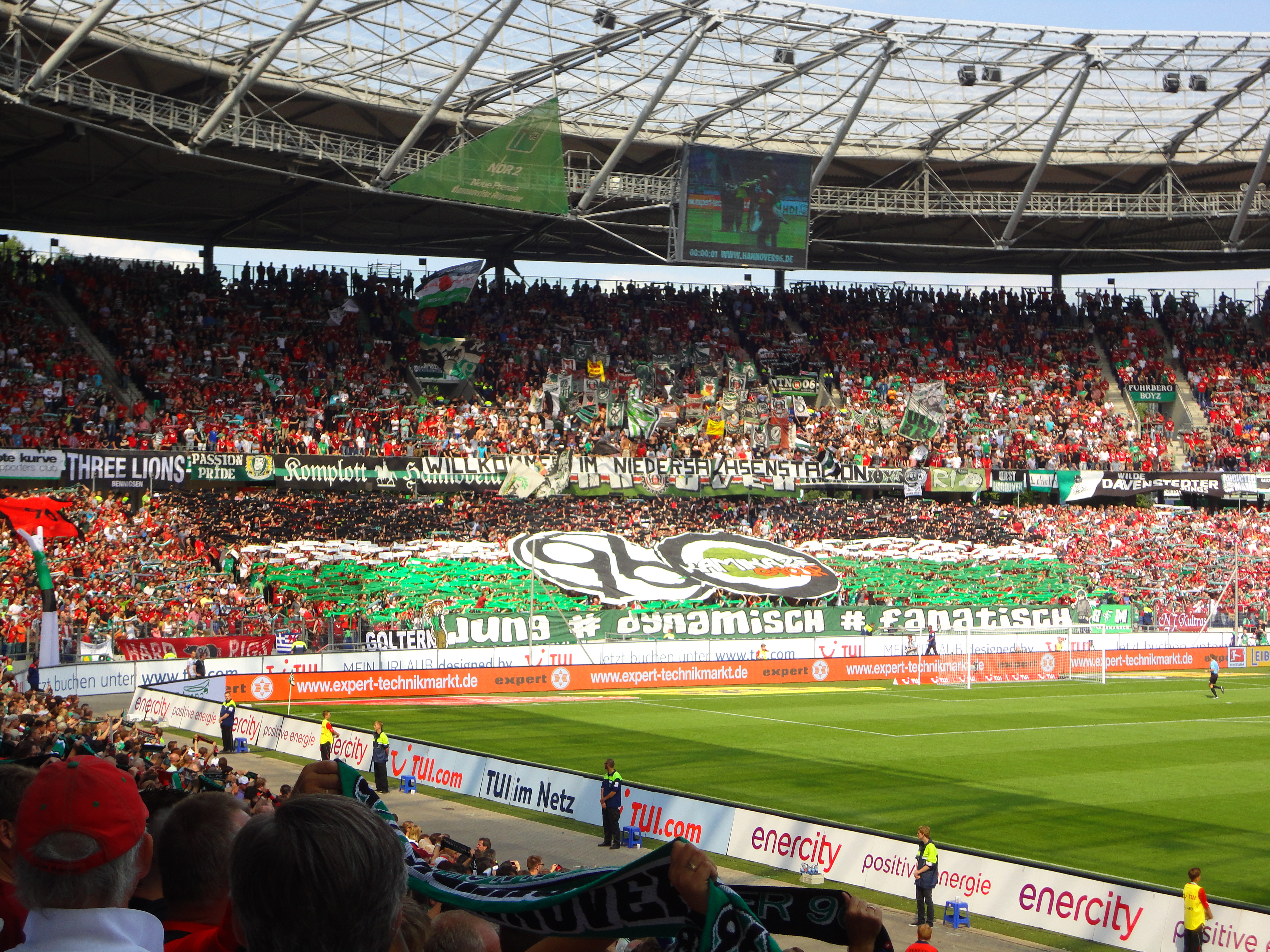 Eine Choreografie der Hannoverschen Fans